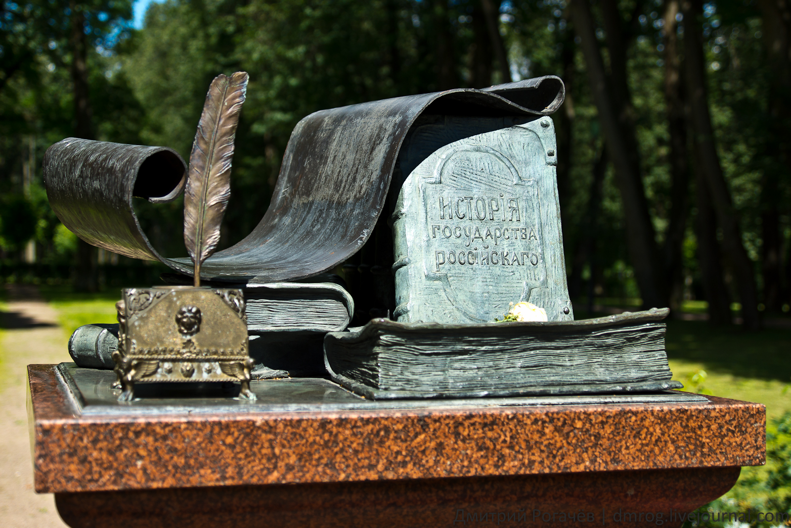 Памятник Николаю Карамзину на территории московской усадьбы "Остафьево"